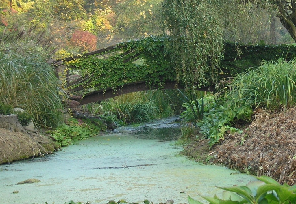 Dendrologická zahrada Průhonice, okres Praha-západ. Podzim hraje v Dendrologické zahradě všemi barvami.